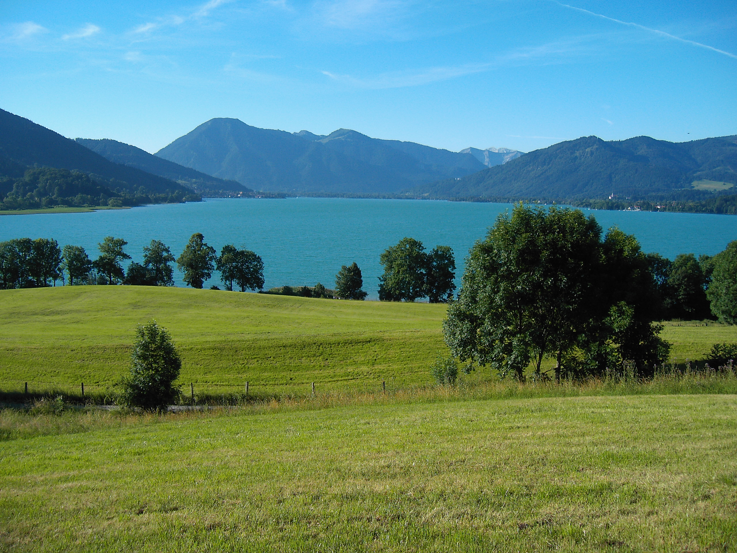 Tegernsee, Landkreis Miesbach, Ansicht von der Nordseite aus (Gut Kaltenbrunn)